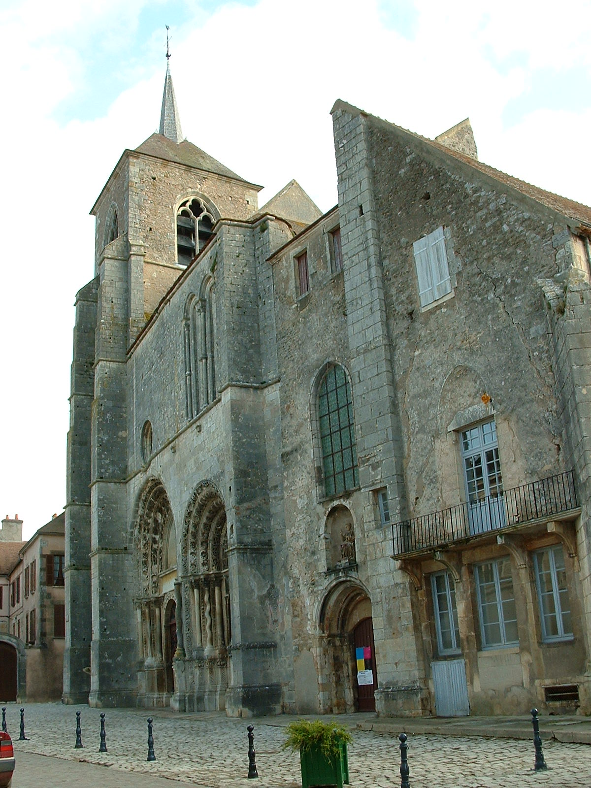 Avallon (Yonne) : Collégiale Saint-Lazare